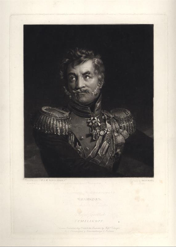 Портрет Антона Степановича Чаликова, генерал-майора